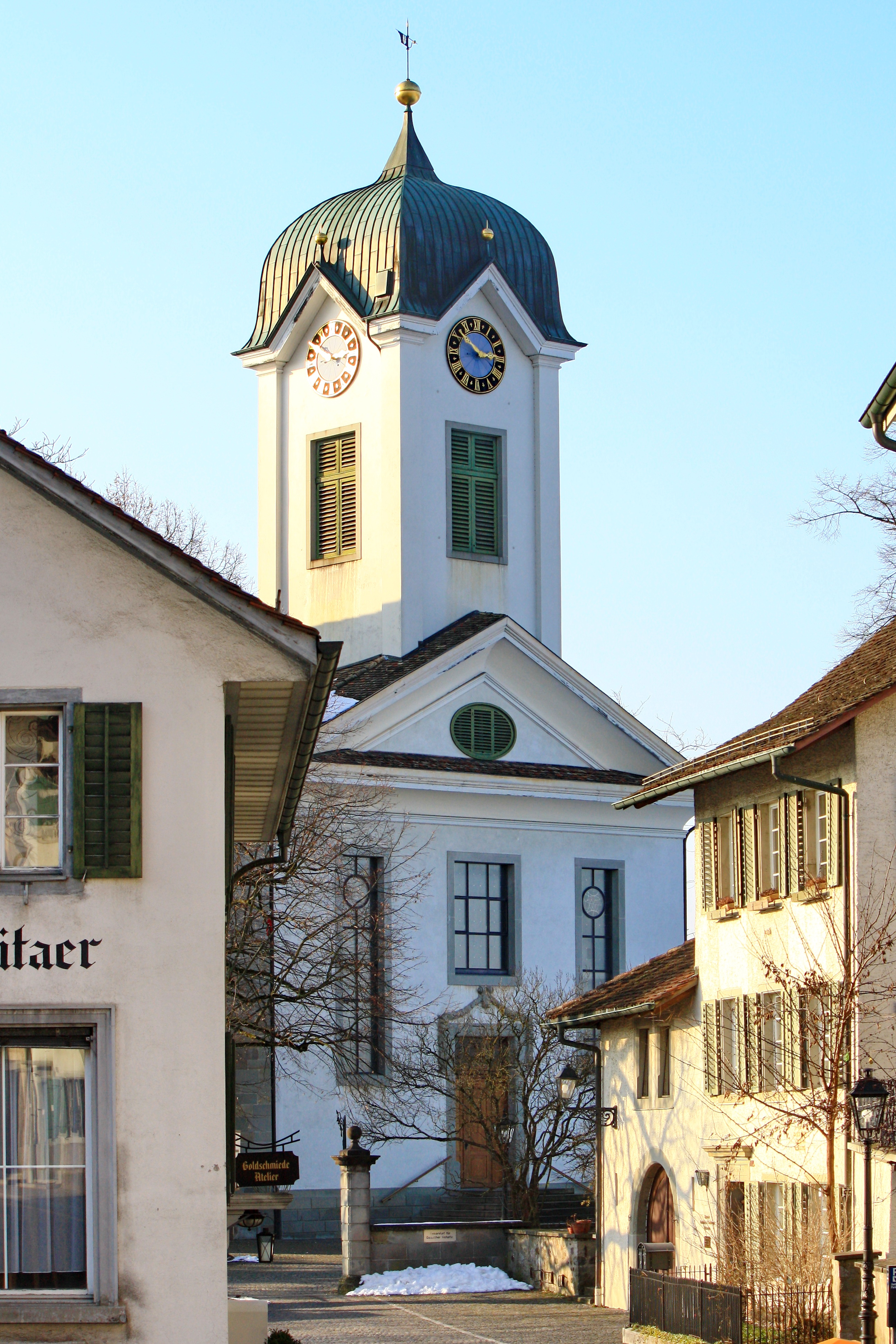 Reformierte Kirche in Grüningen (Switzerland)